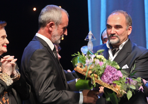 Римас Туминас и Борис Беленький, премия «Хрустальная Турандот».